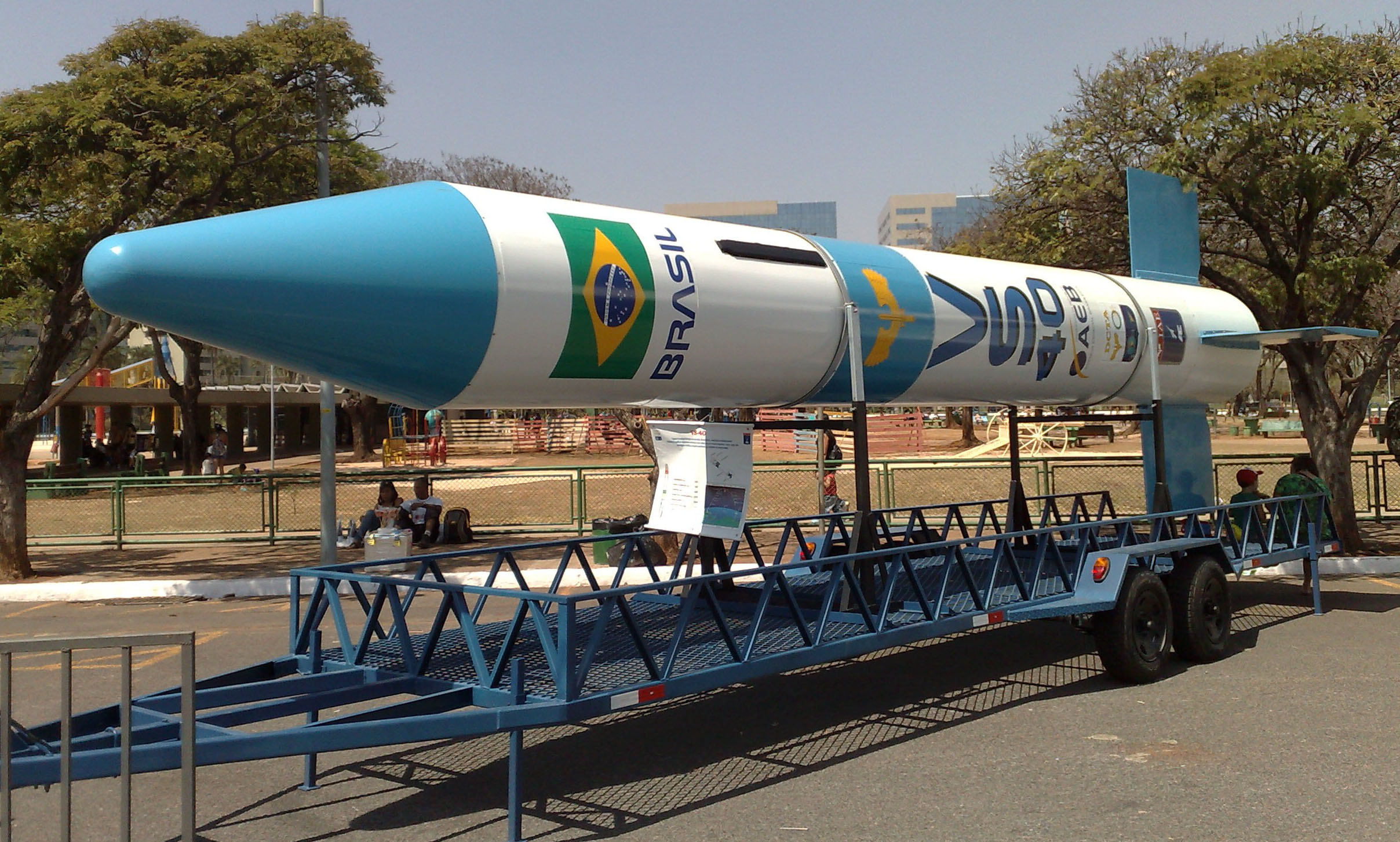 Foguete VS-40 em exposição no Parque Ana Lídia, Brasília-DF